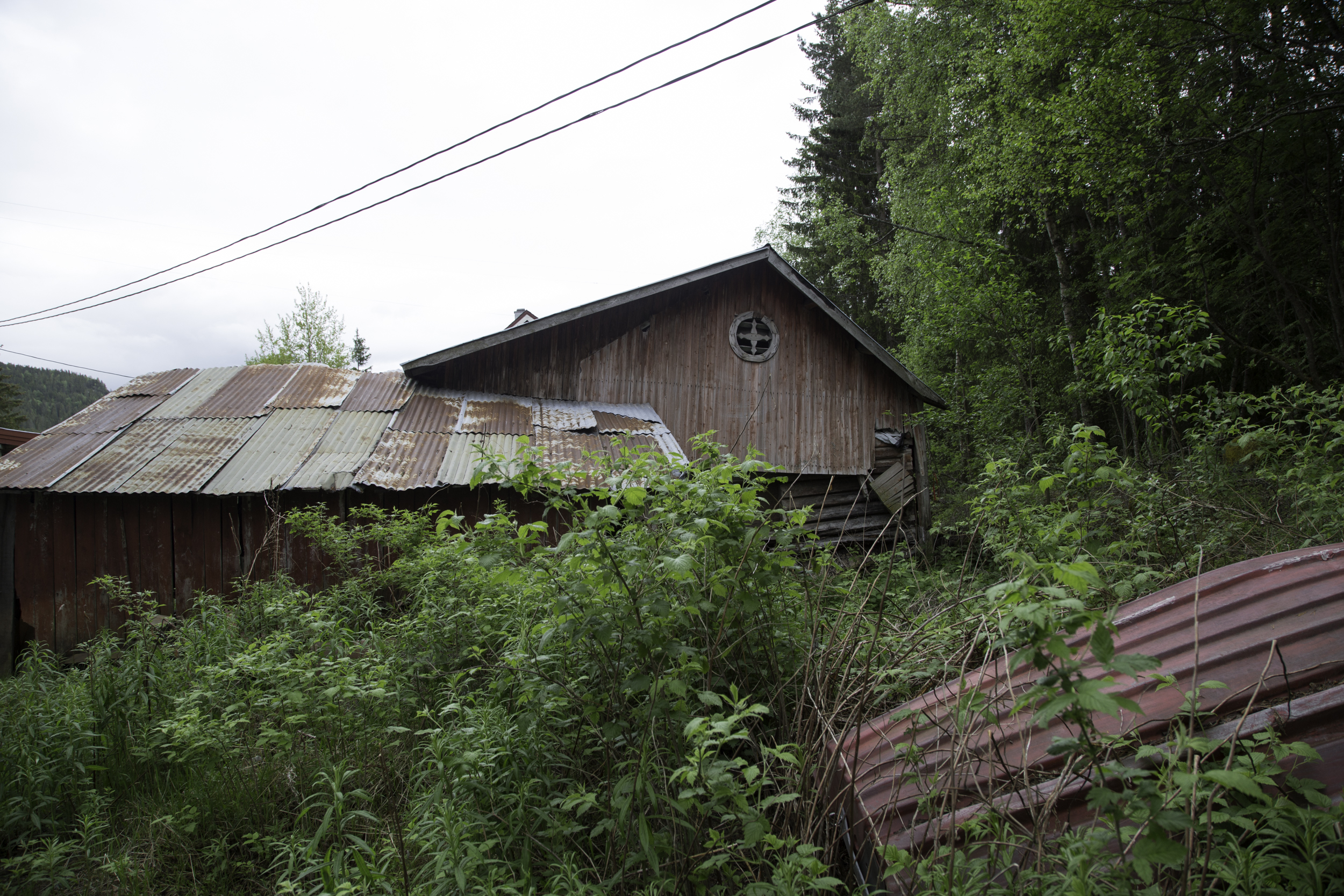 Valdresrose på låvevegg